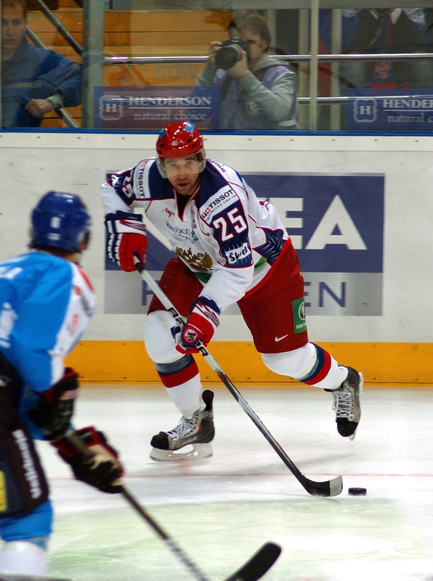 Игрок сборной России по хоккею Данис Зарипов на Кубке Первого канала 2010, Москва